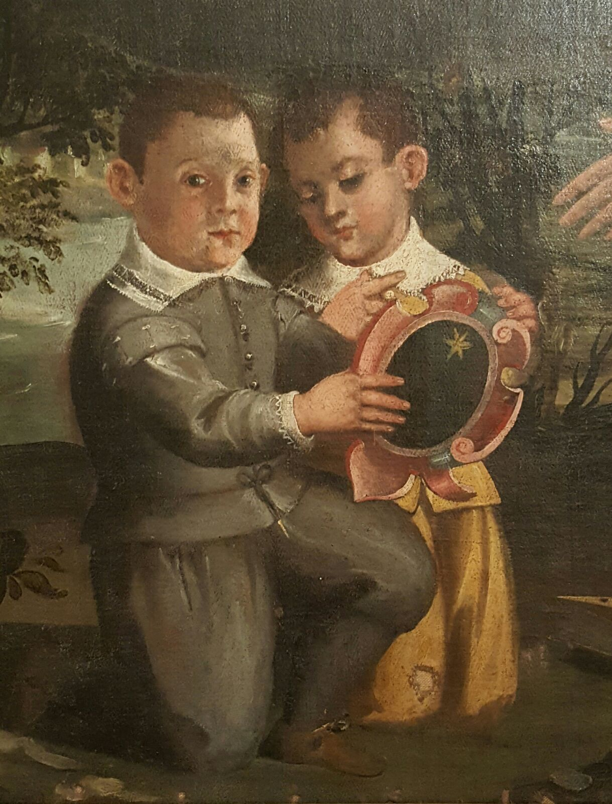 L'Immacolata di Bernardo e Vitale Guerrini, 1610 circa Particolare dei fanciulli che reggono lo stemma di Saludecio, presso il Museo del Beato Amato Ronconi, prima Sala